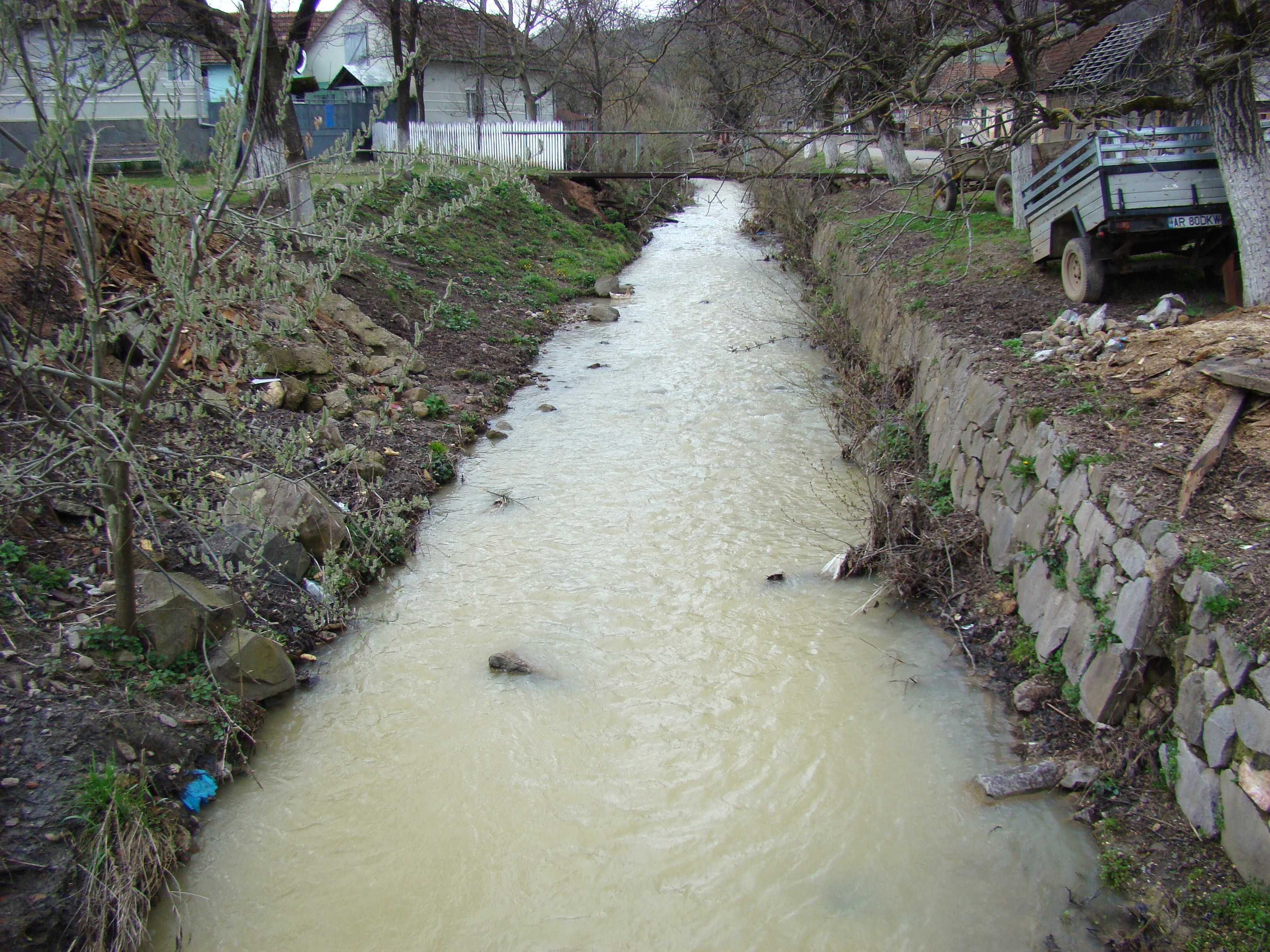 Râul Măreasca în satul Secaș